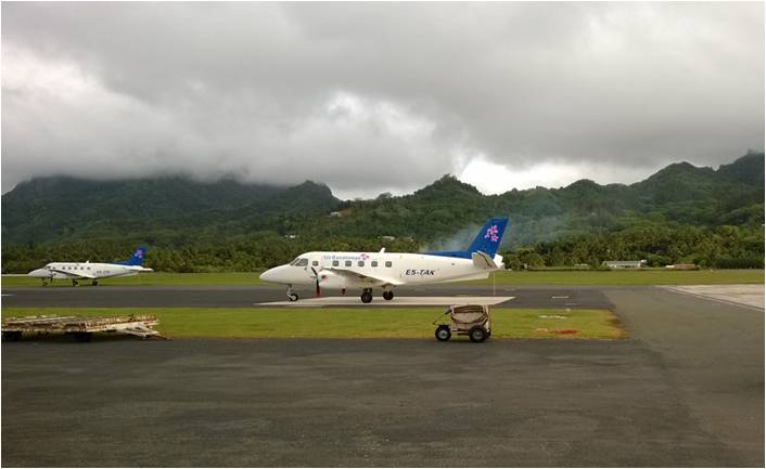 Air Rarotonga planes at Rarotonga International Airport